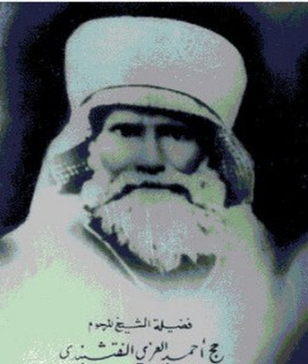 الشيخ أحمد العزي النقشبندي بنى اول تكية في مدينة دير الزور في سورية والتي عرفت باسم ولده ومحمد اويس النقشبندي